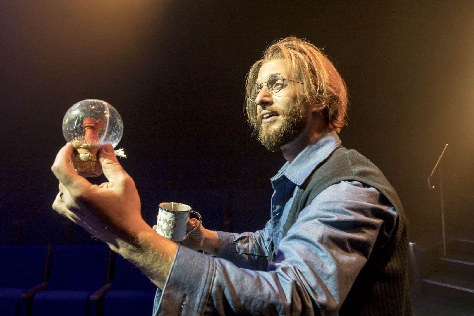 שחר רז בתפקיד צ'רינגטון בהצגה 1984